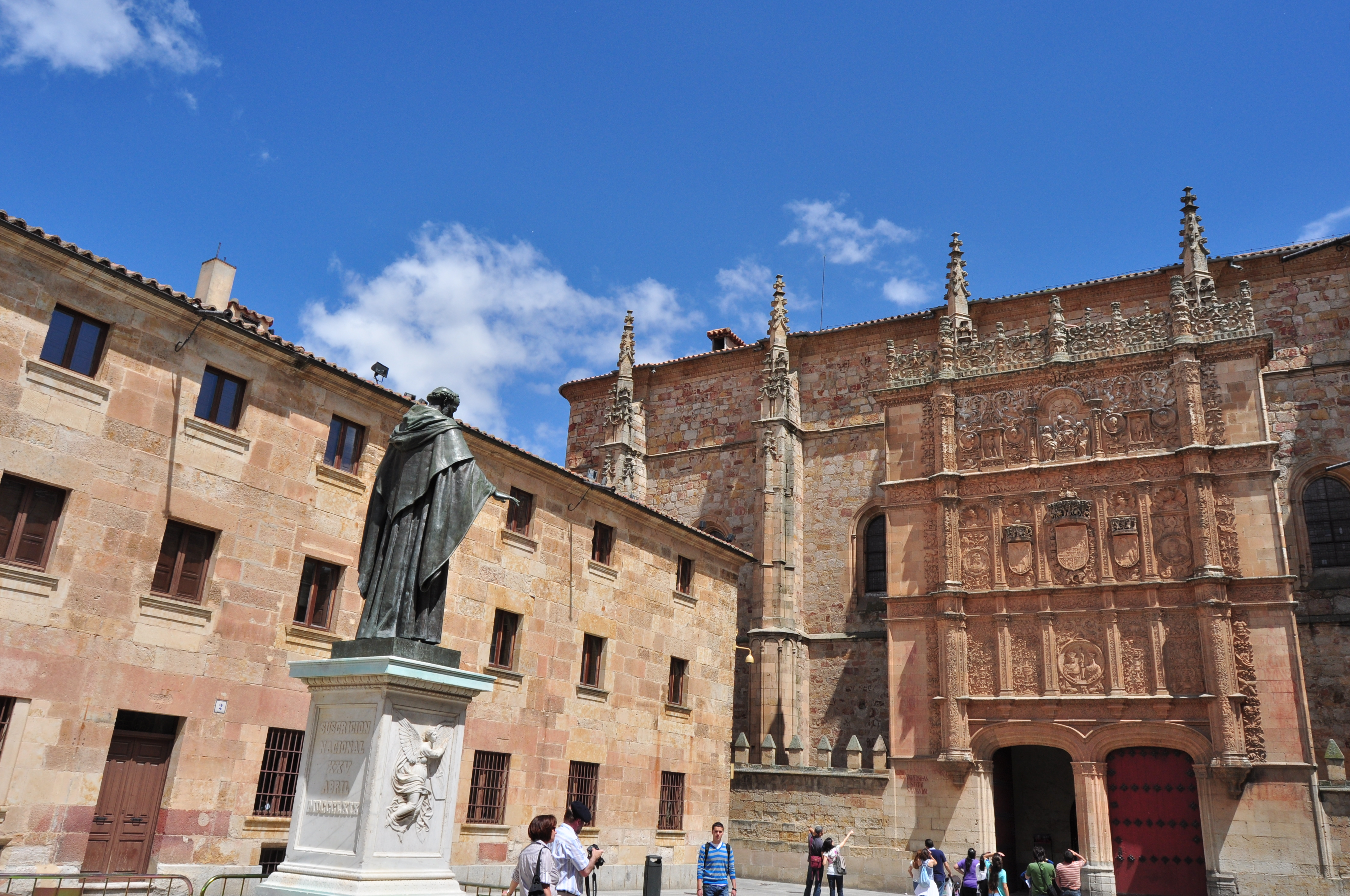 Salamanca Capital - 068